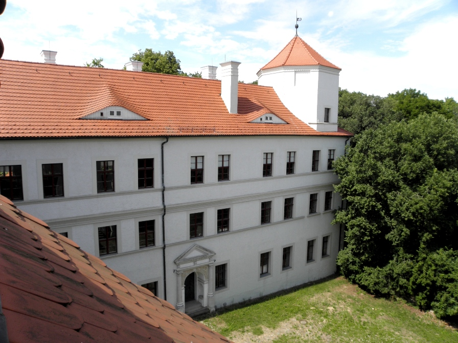 zamek w Penkun